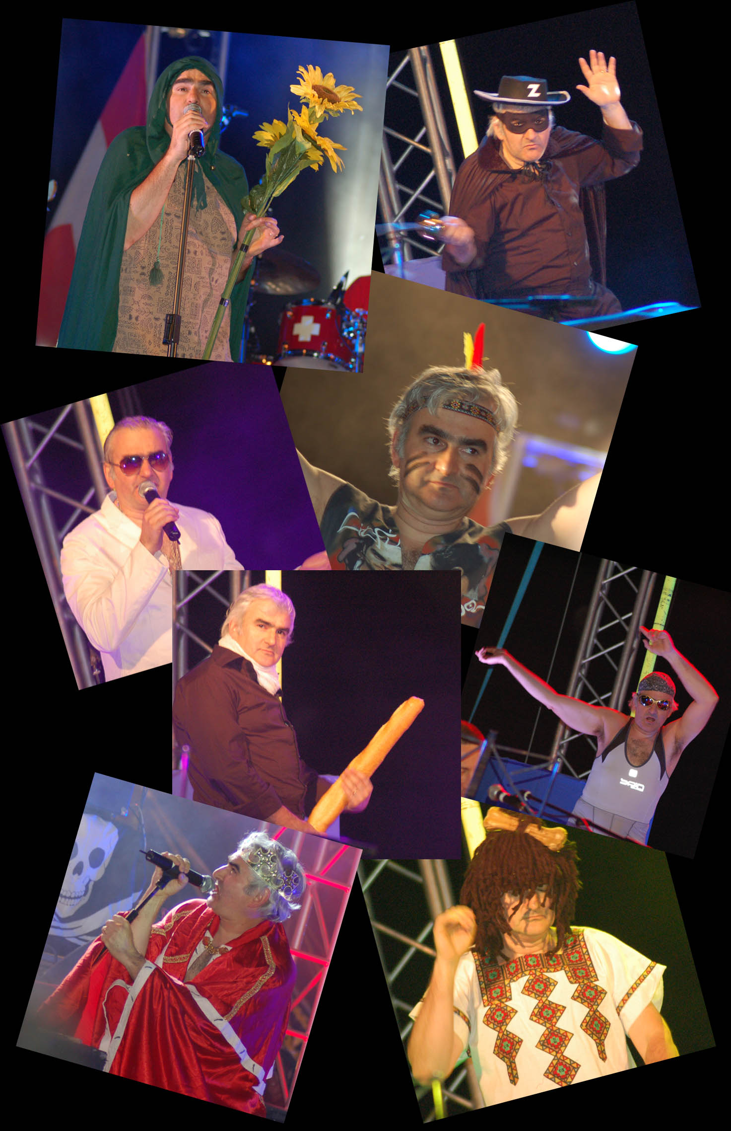 I mille volti di Mangoni, animale da palco!